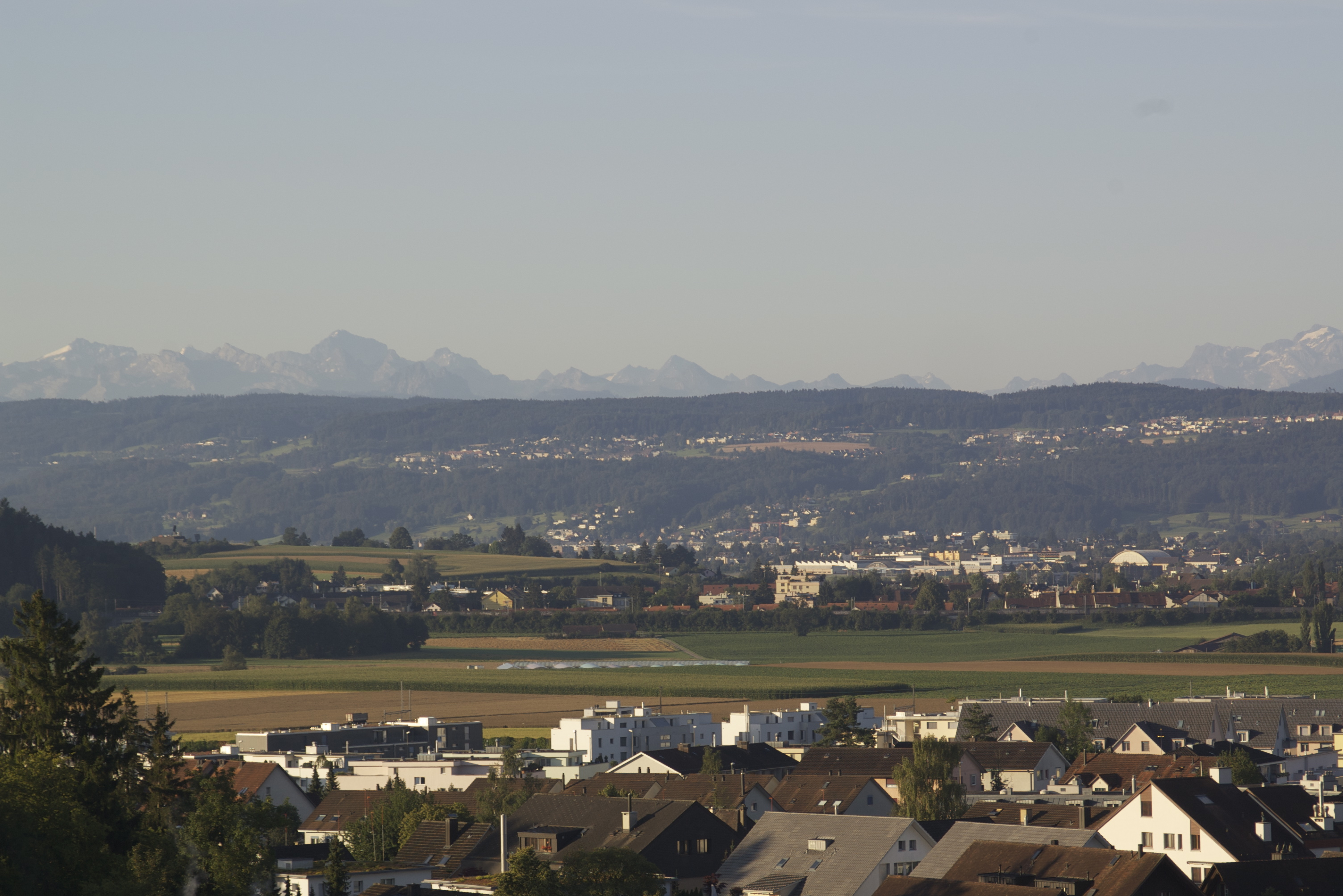 Blick von der Ebene über Bassersdorf gen Brüttisellen.